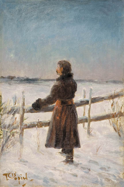 "Pierwsza gwiazdka", olej na płótnie, 40.3 x 27 cm